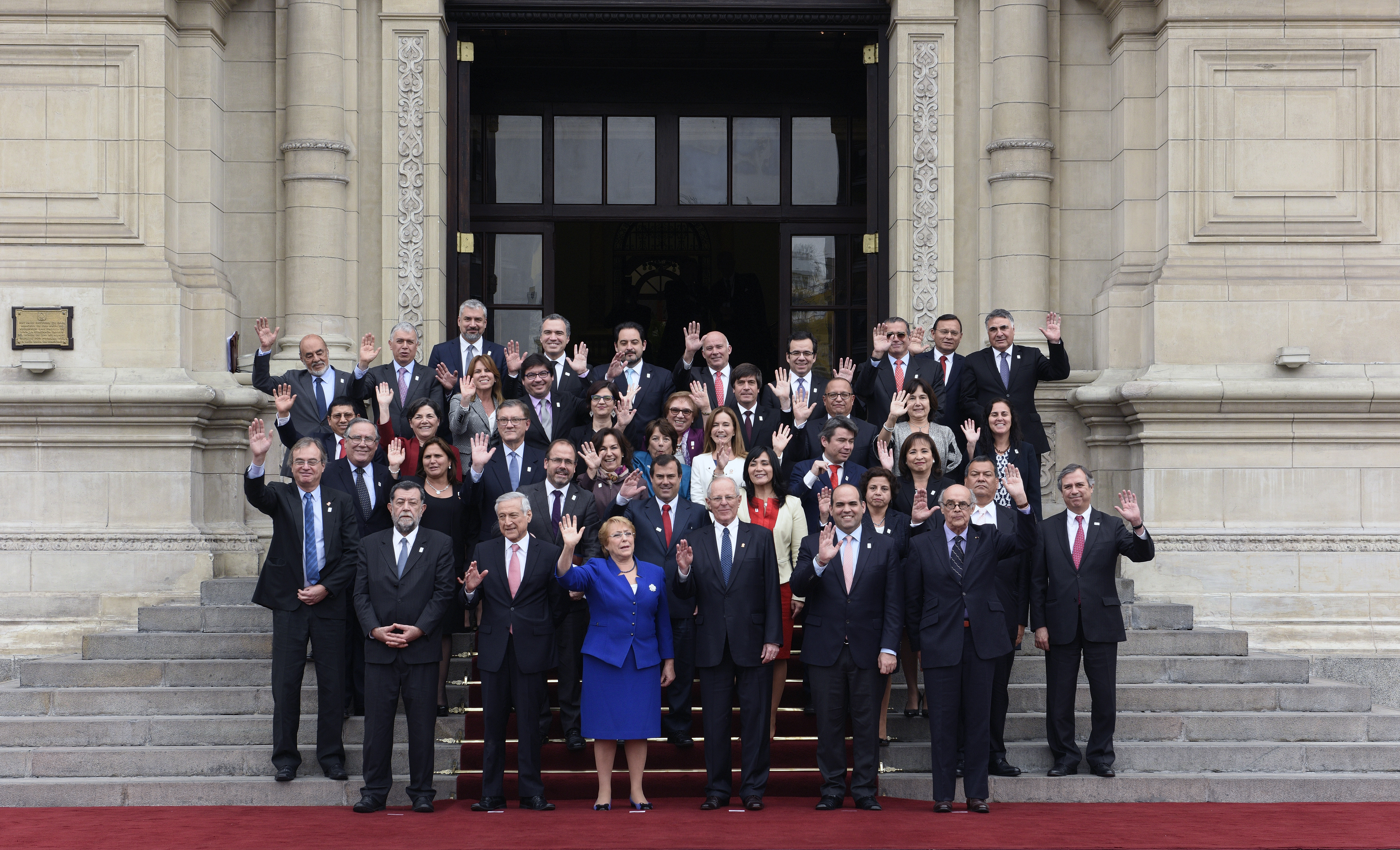 Los Presidentes del Perú y de Chile posaron junto a sus Ministros para la Fotografía Oficial del Encuentro Presidencial y I Gabinete Binacional Perú-Chile.